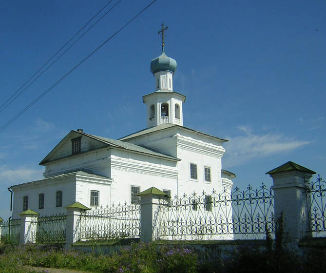 Церковь Иоанна Богослова в Чердыни